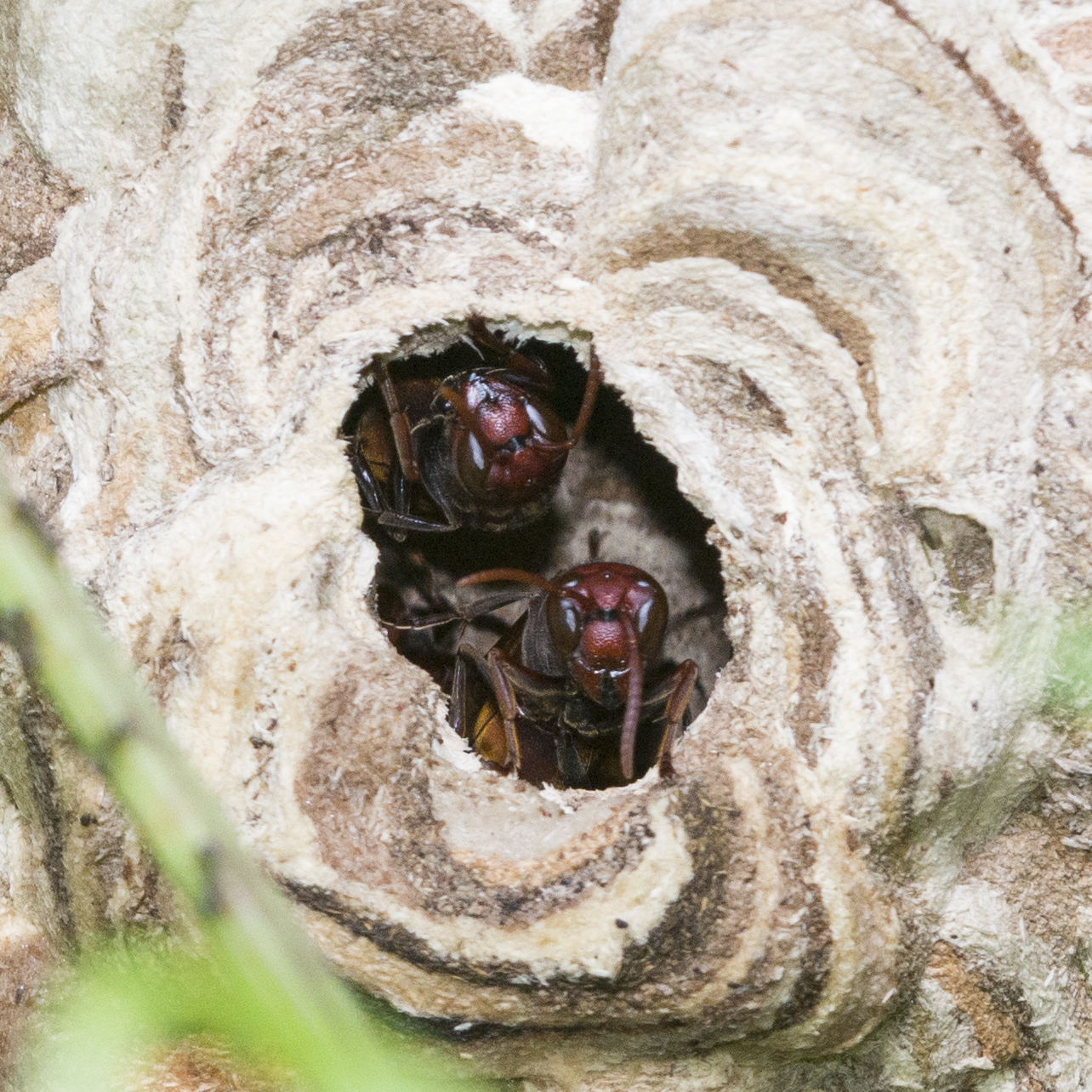 Vespa affinis (Linnaeus, 1764) 黃腰虎頭蜂